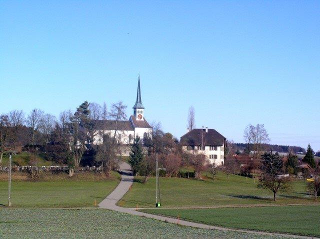 Reformierte Kirche mit Pfarrhaus Seuzach